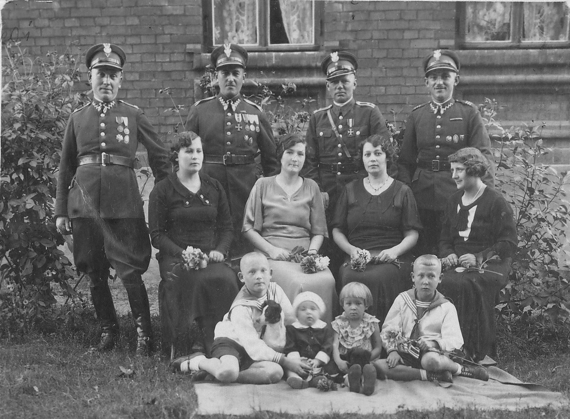 Podoficerowie 16 Szwadronu Kawalerii KOP z rodzinami. Od lewej wachm. Jan Korościk z żoną Serafiną, st. wachm. Franciszek Ratajczak z żoną Stanisławą, chor. Marian Przędzik z żoną Bronisławą, plut. Antoni Krawczyk z żoną Konstancją; dzieci: Anatol Korościk, Henryk i Krystyna Ratajczakowie, Aleksander Korościk. Lenin, 1935 r.